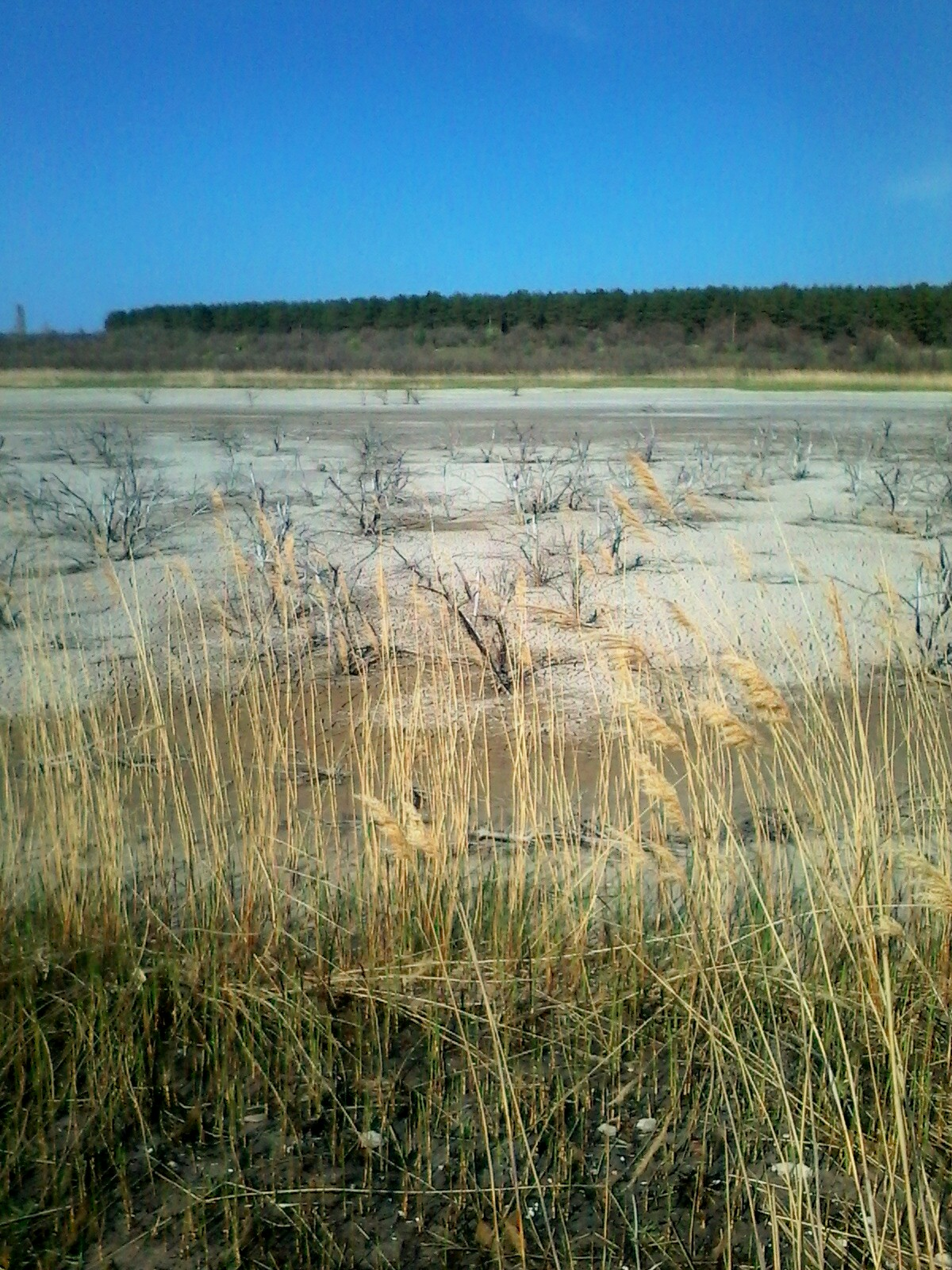 Покинутий ставок, який інколи заповнюється водою з Південного Бугу